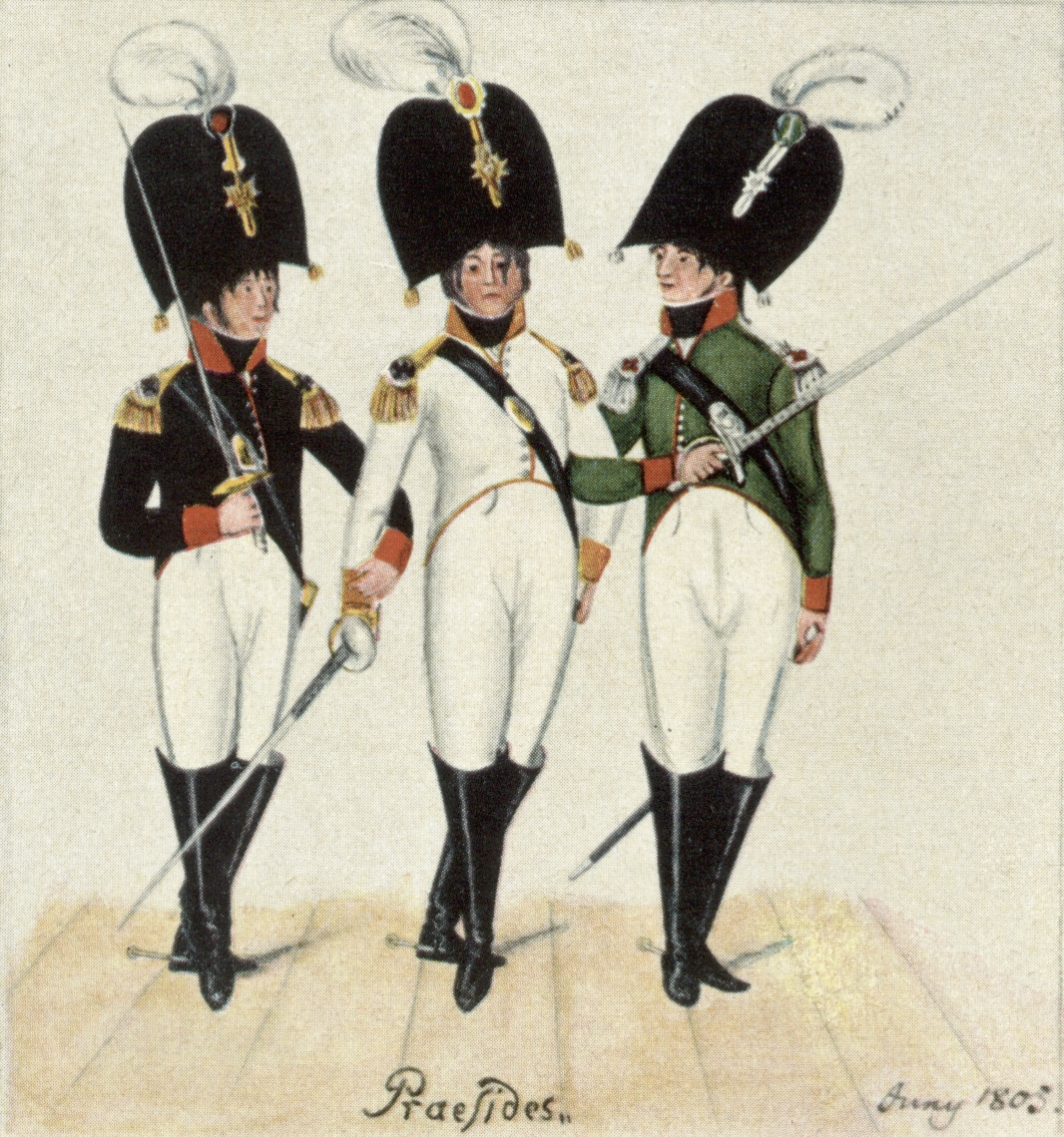 Chargierte der drei Frankfurter (Frankfurt/Oder) Kränzchen 1805, links (schwarzer Frack) Silesia, Mitte (weißer Frack) Marchia, rechts (grüner Frack) Borussia